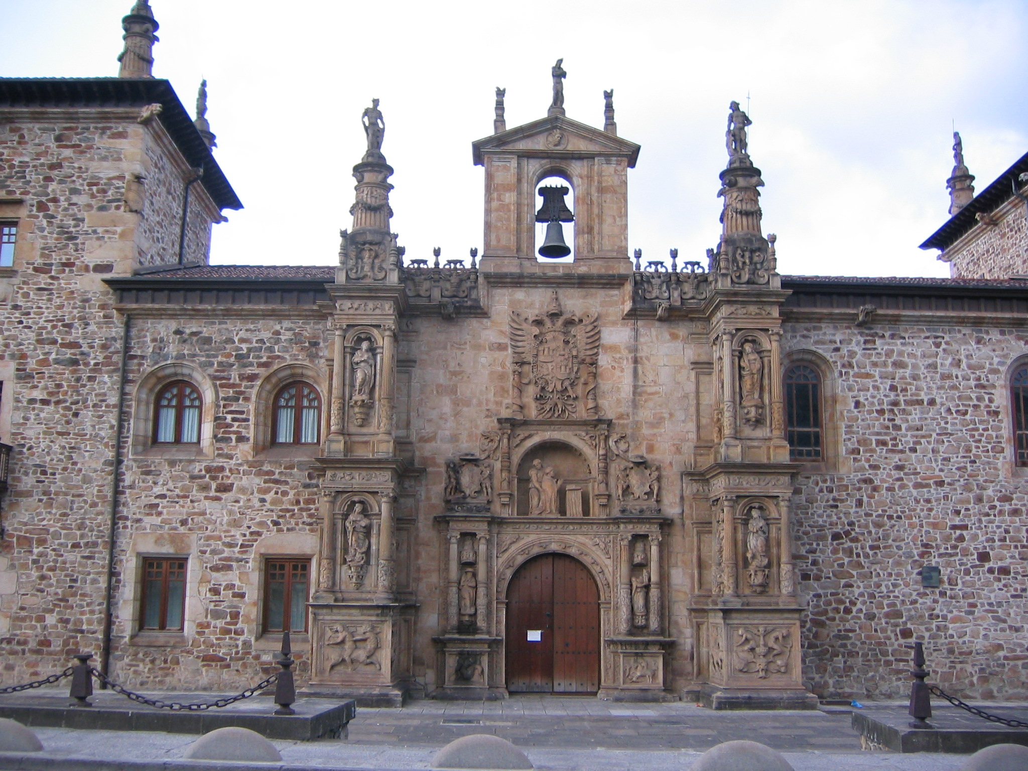 Universidad de Oñate (Guipúzcoa) País Vasco (España).